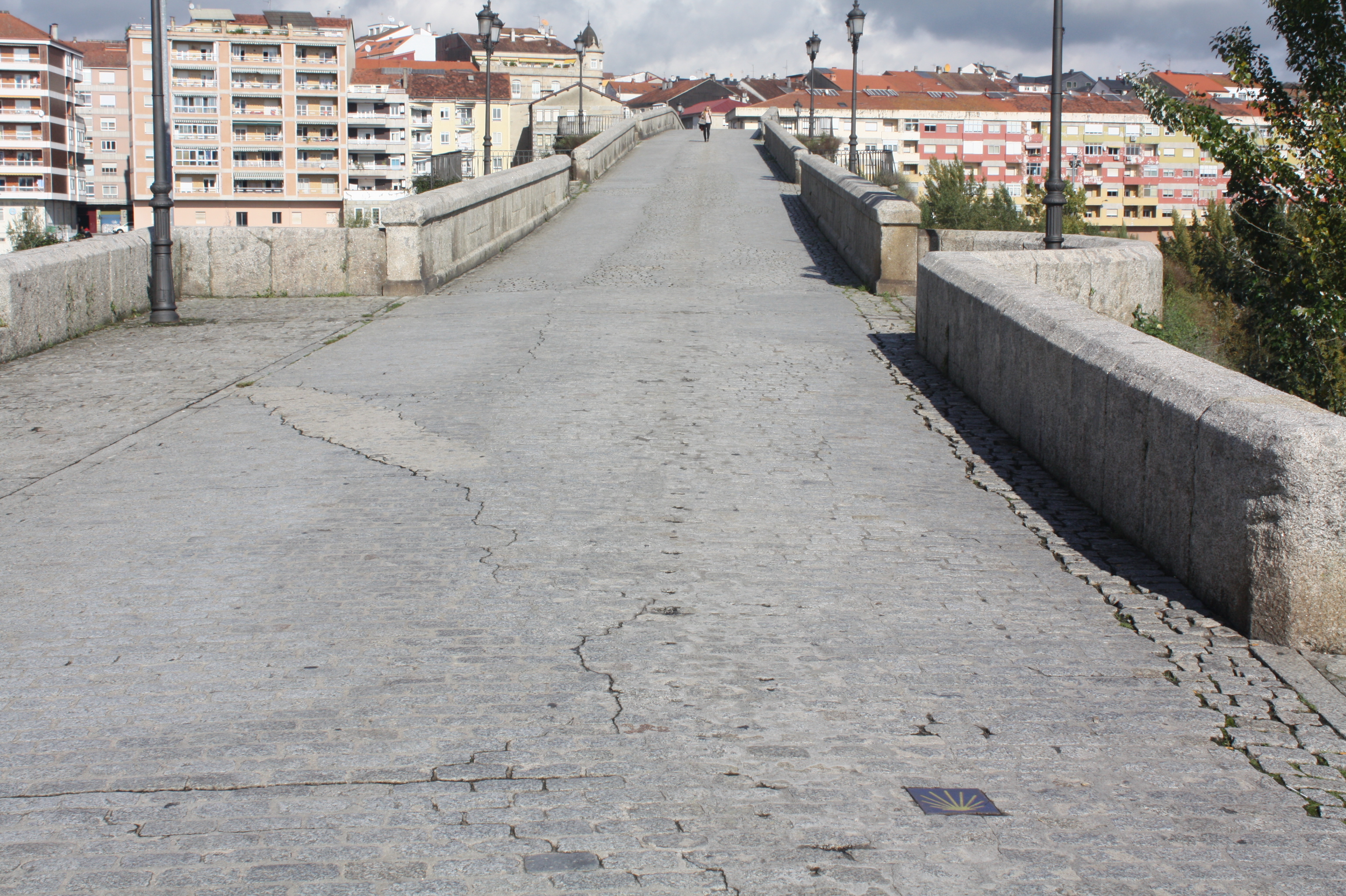 Ponte romana de Ourense. Notese a cuncha indicativa do Camiño de Santiago na parte inferior da fotografía.